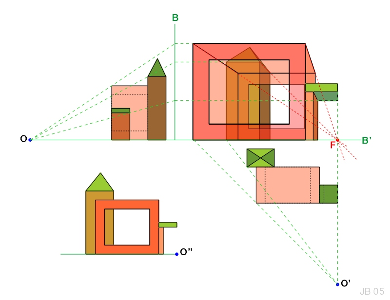 Beispiel einer Perspektive mit einem Fluchtpunkt. Konstruktionsprinzip erkennbar.